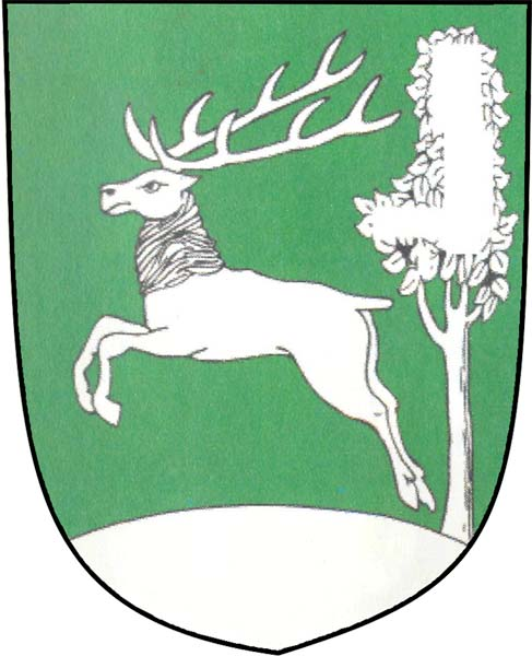 Znak obce Omice